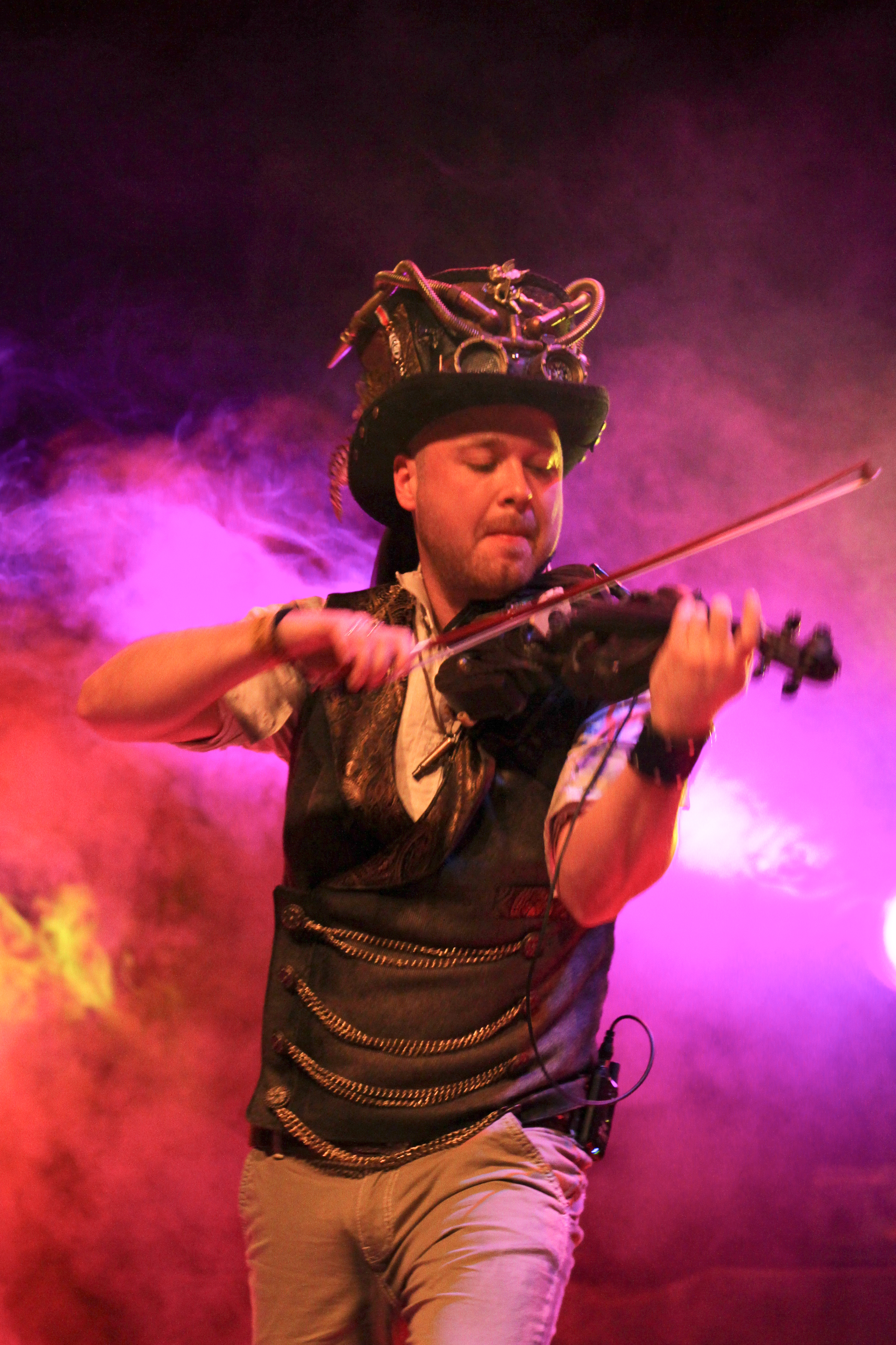 Titus Munteanu